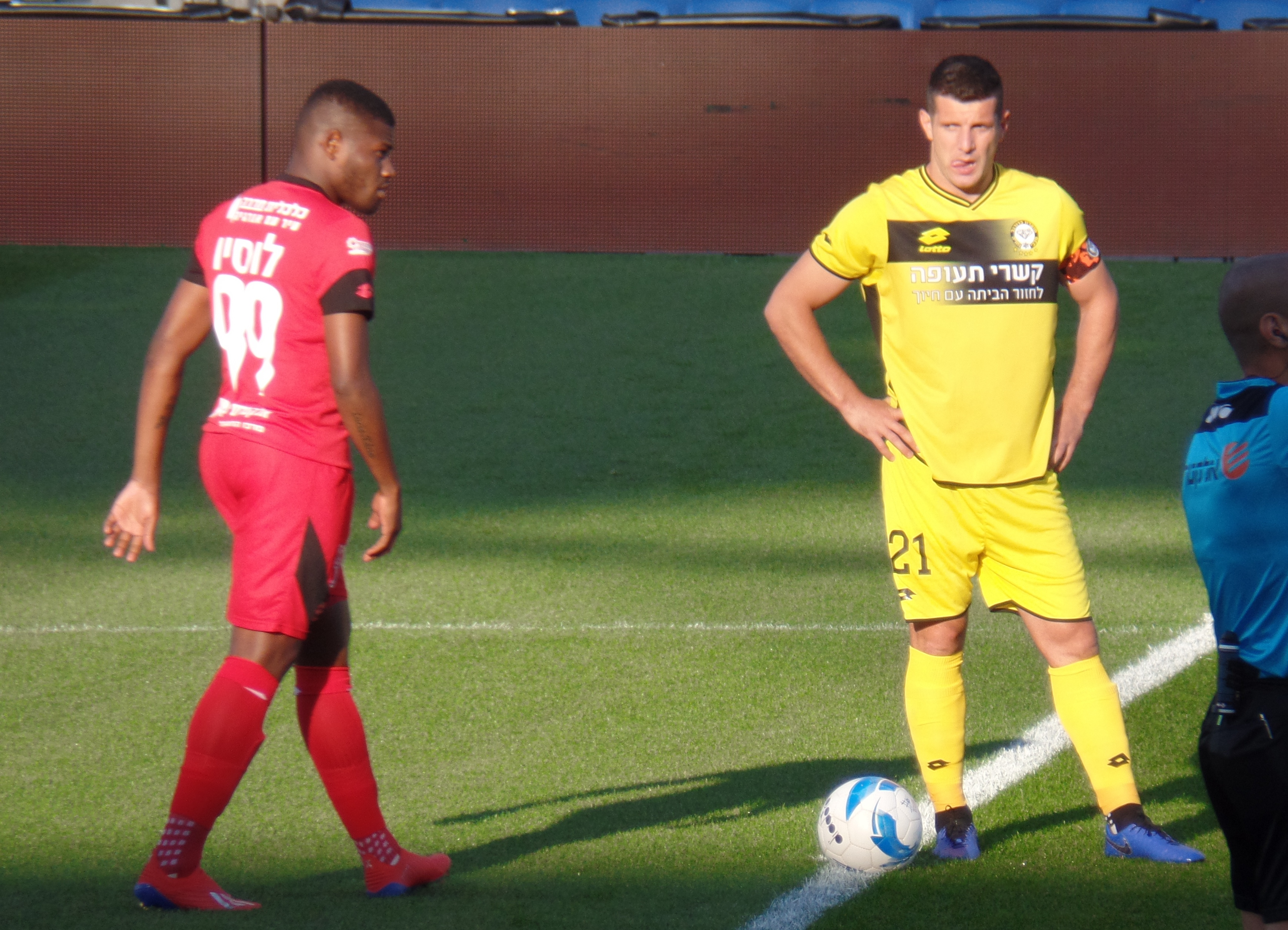 Lúcio Maranhão & Fatos Bećiraj